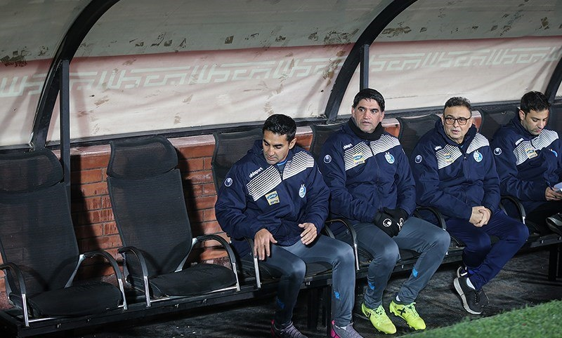 تیم فوتبال استقلال در دیدار هفته پانزدهم رقابت‌های لیگ برتر از ساعت ۱۷:۳۰ شنبه، ۲۳ آذر ۱۳۹۸ در ورزشگاه آزادی میزبان شاهین شهرداری بوشهر بود و با نتیجه ۴ بر یک به برتری رسید. گل‌های استقلال را در این بازی آرش رضاوند (۲۹)، مهدی قائدی (۵۲)، محمد دانشگر (۵۸) و شیخ دیاباته (۶۹) به ثمر رساندند و روزبه چشمی (۸۸ - گل به خودی) برای شاهین گلزنی کرد. (مشاهده گزارش بازی)